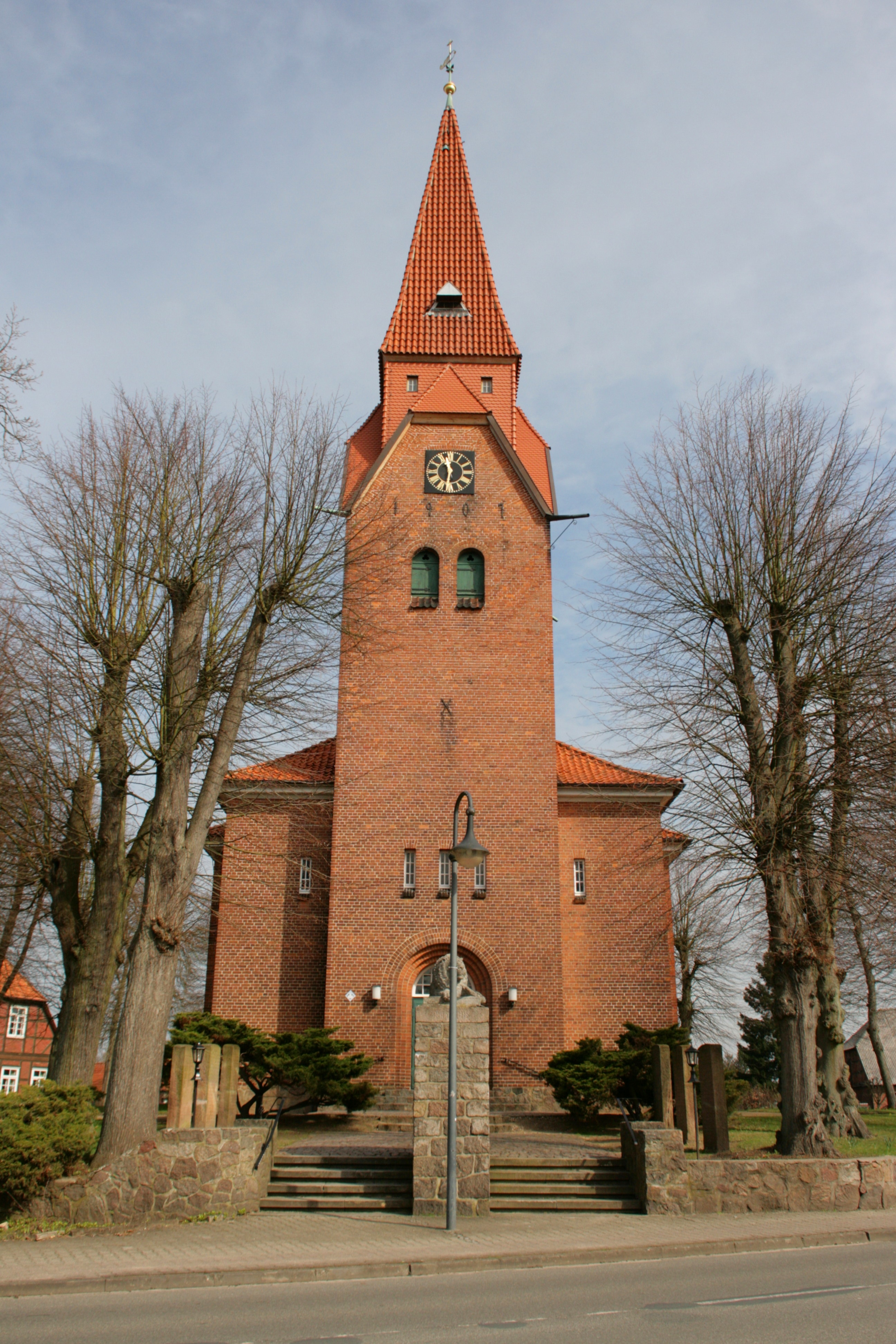 St.-Michaelis-Kirche im Dreieck Bahnhofstraße/Niendorfer Straße/Kirchplatz in Bienenbüttel